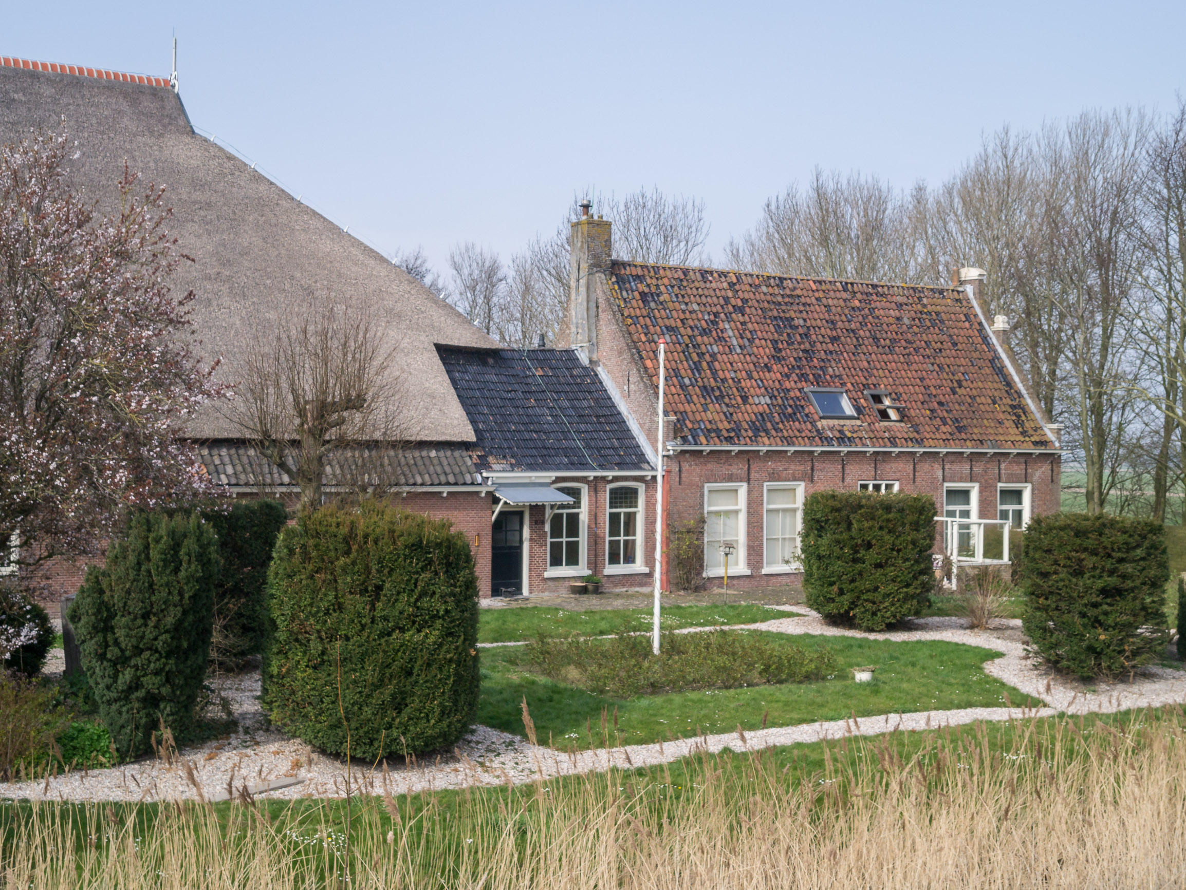 Oudebildtdijk 976, Sint Annaparochie